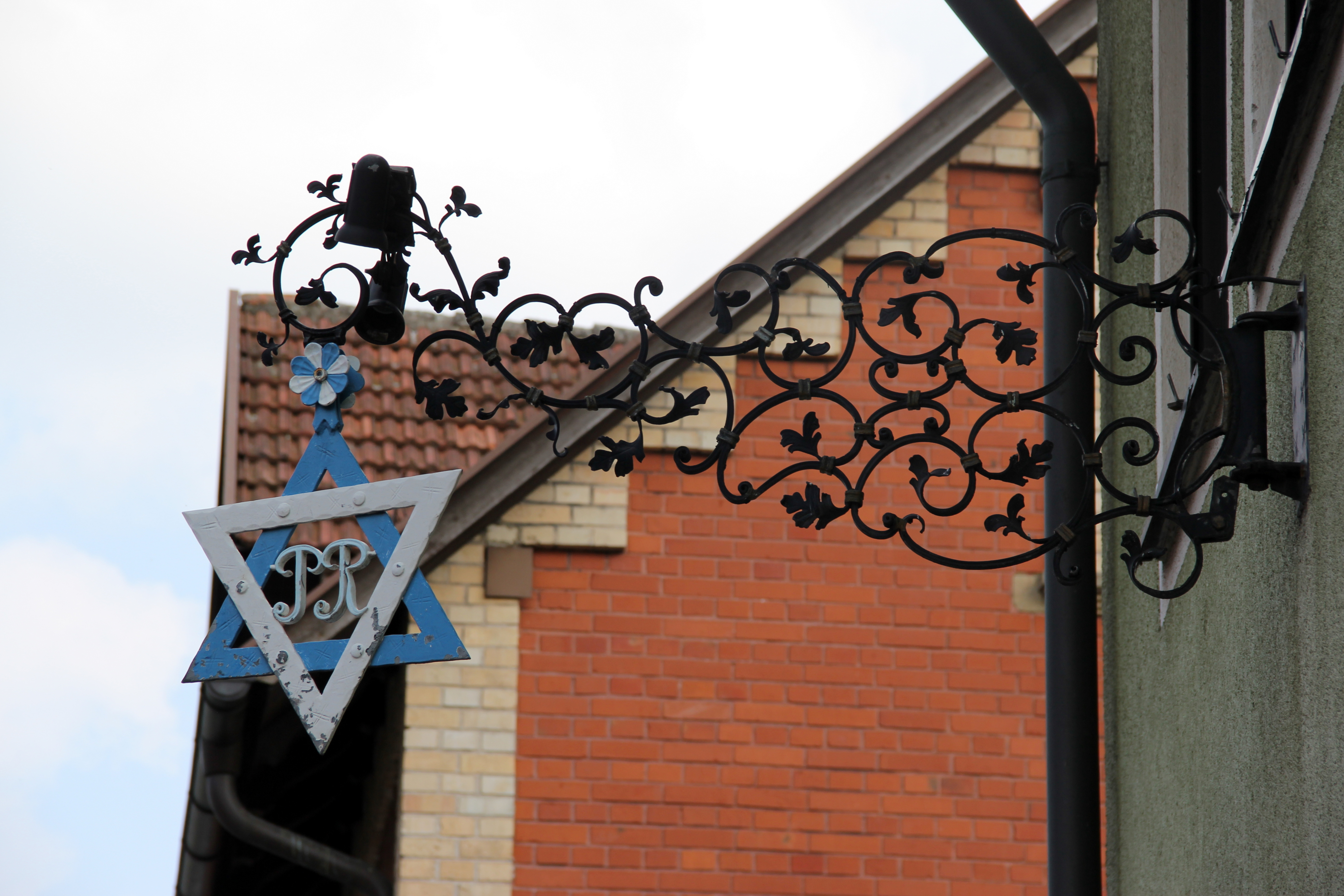 Neuhaus a.d. Pegnitz, Bierzoigl